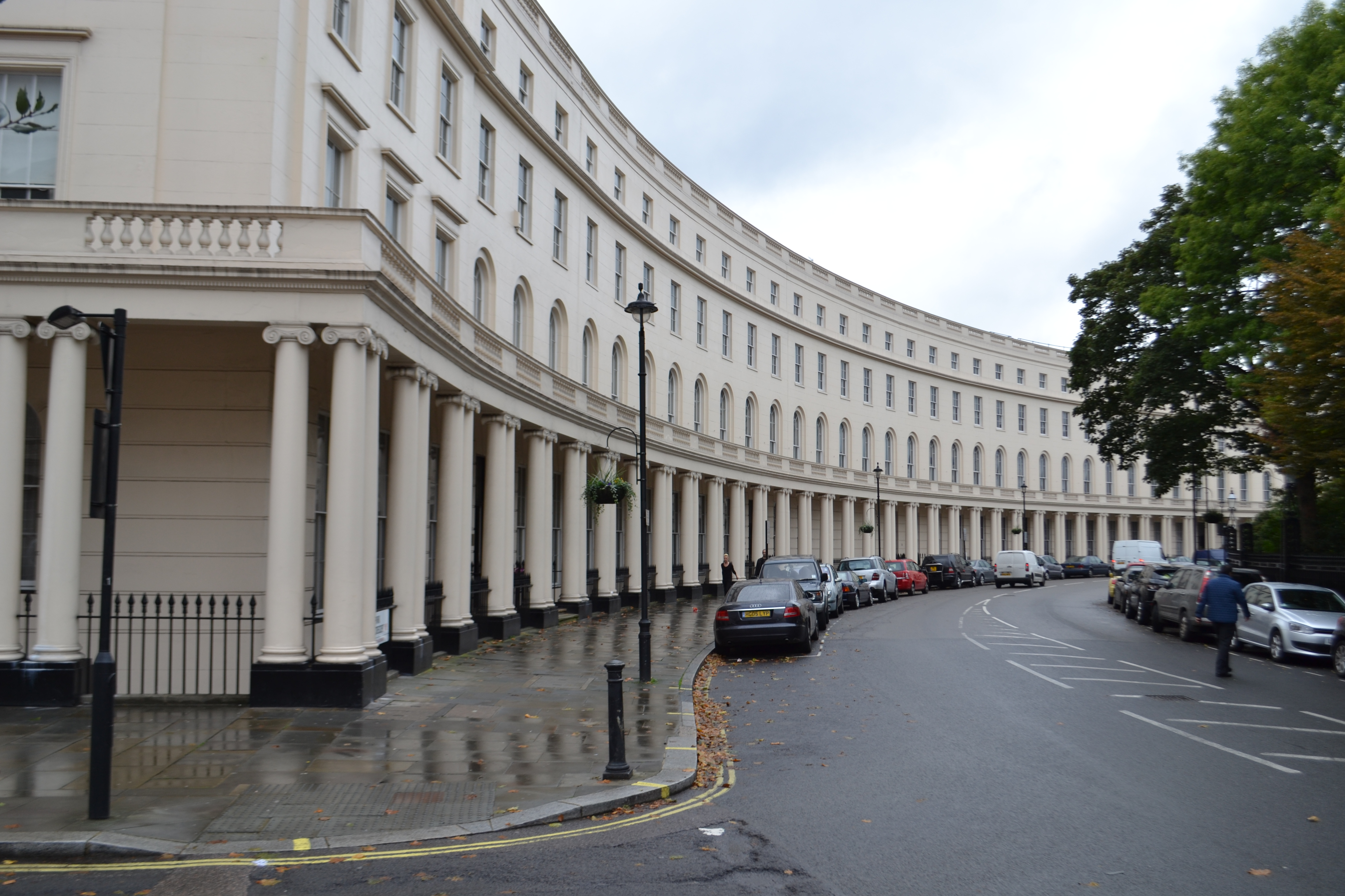 Park Crescent, Londres, en 2013.